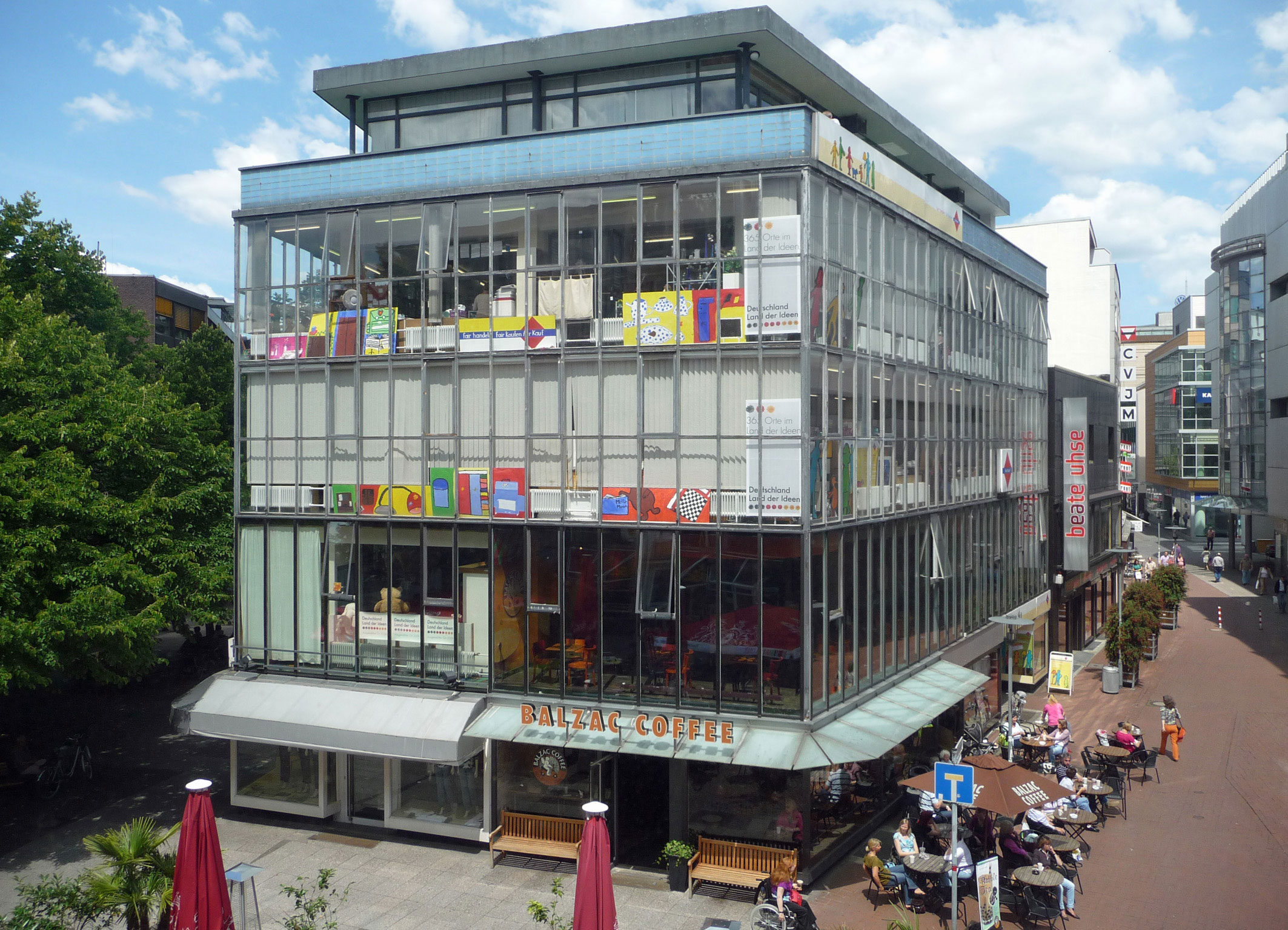 Für "fairKauf, das soziale Kaufhaus in Hannover", betitelte Reinhold Fahlbusch, Vorsitzender der Genossenschaft und Urheber dieses Fotos sein Bild "Mitten in der Stadt 2".